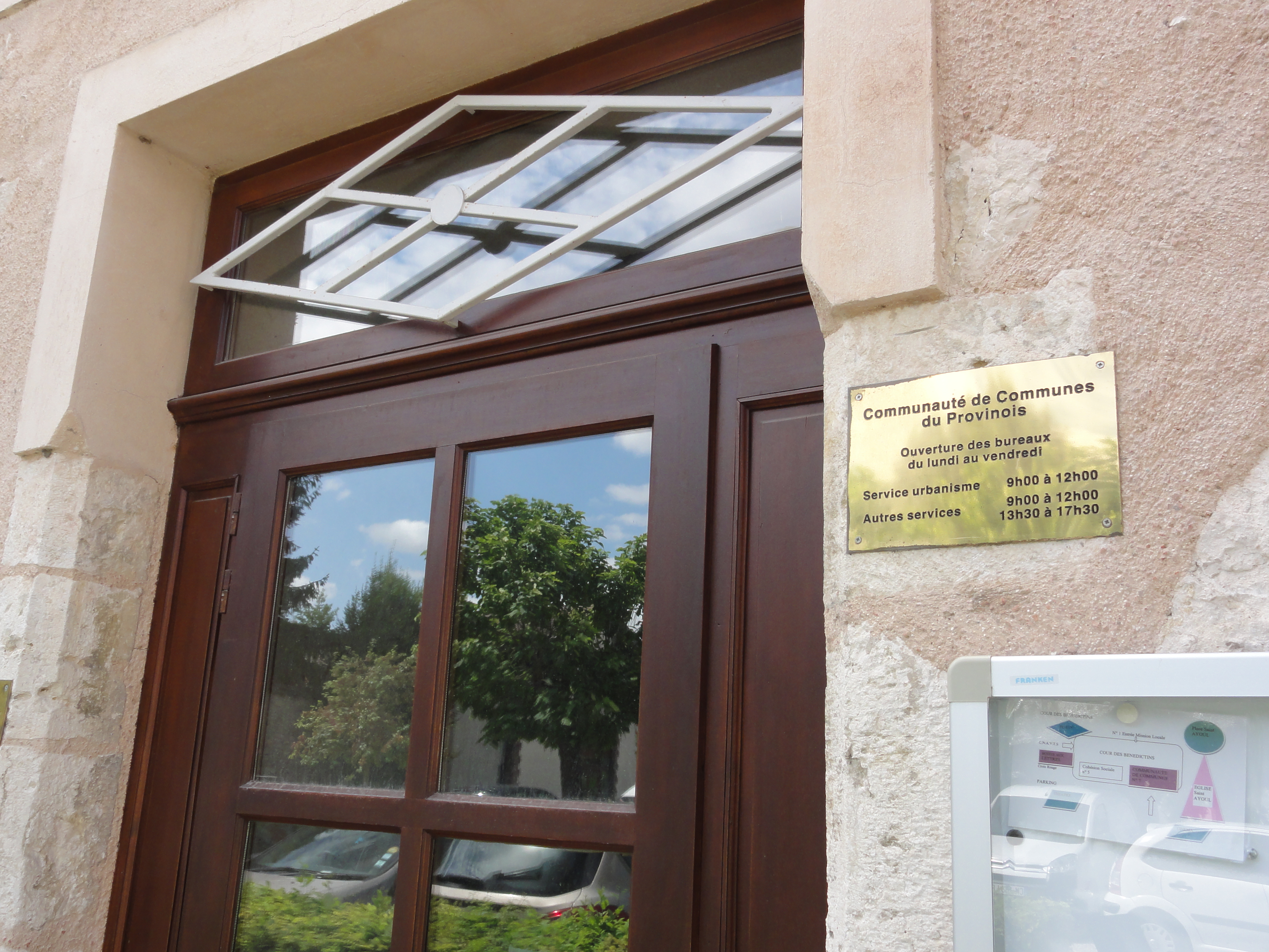 Provins (Seine-et-Marne) entrée bureaux Communauté de communes de Provinois